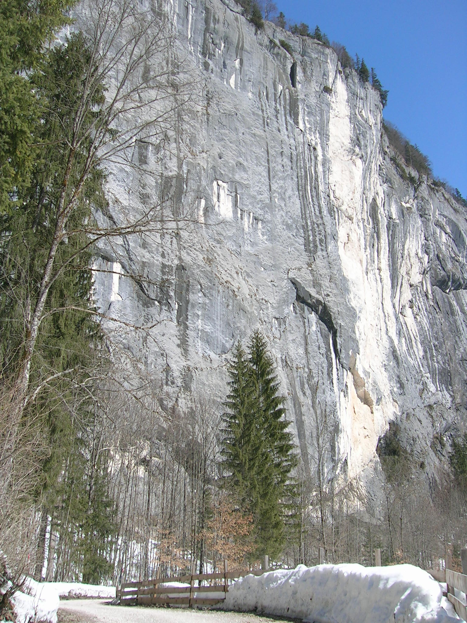 Gösslerwand